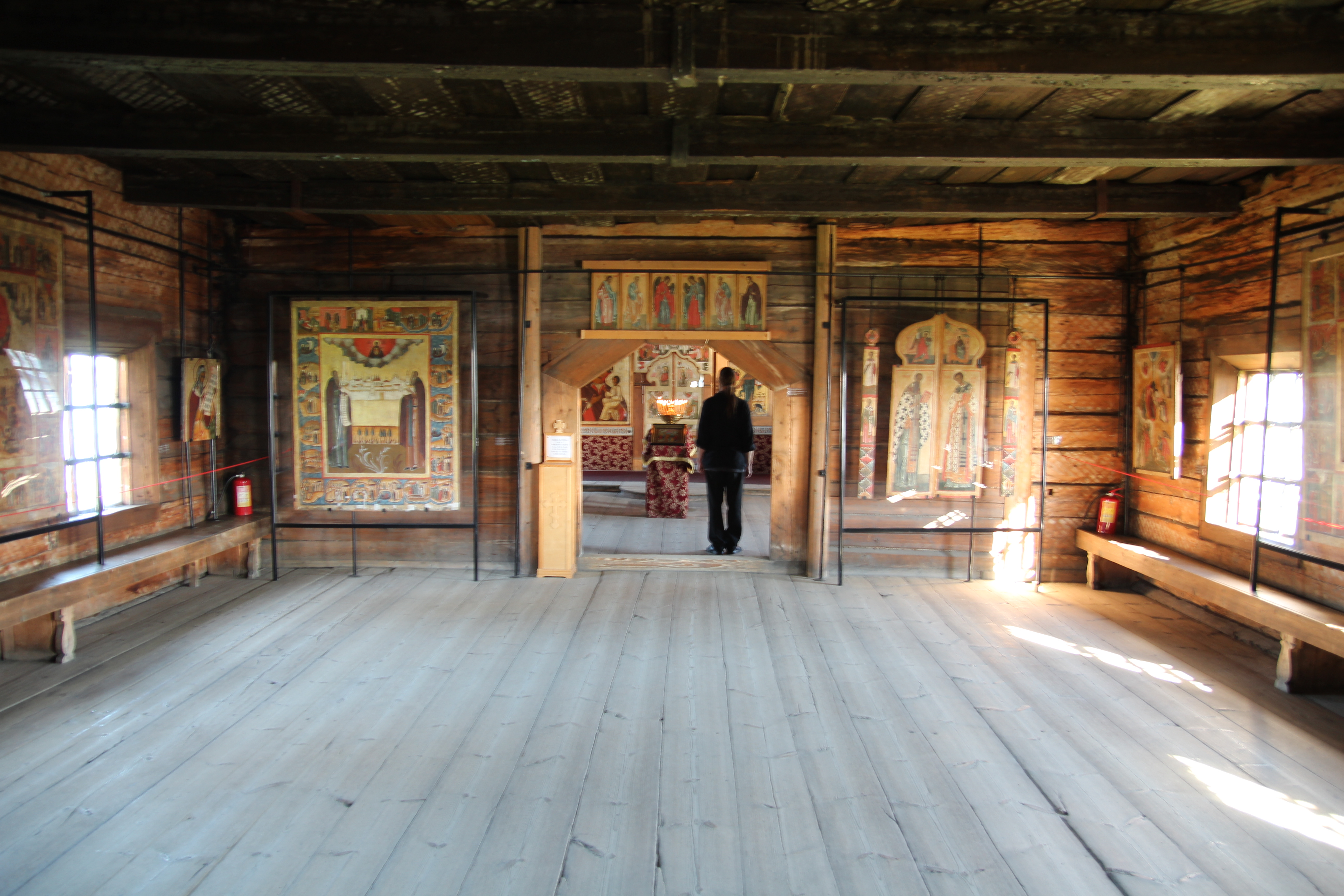 В Покровской церкви